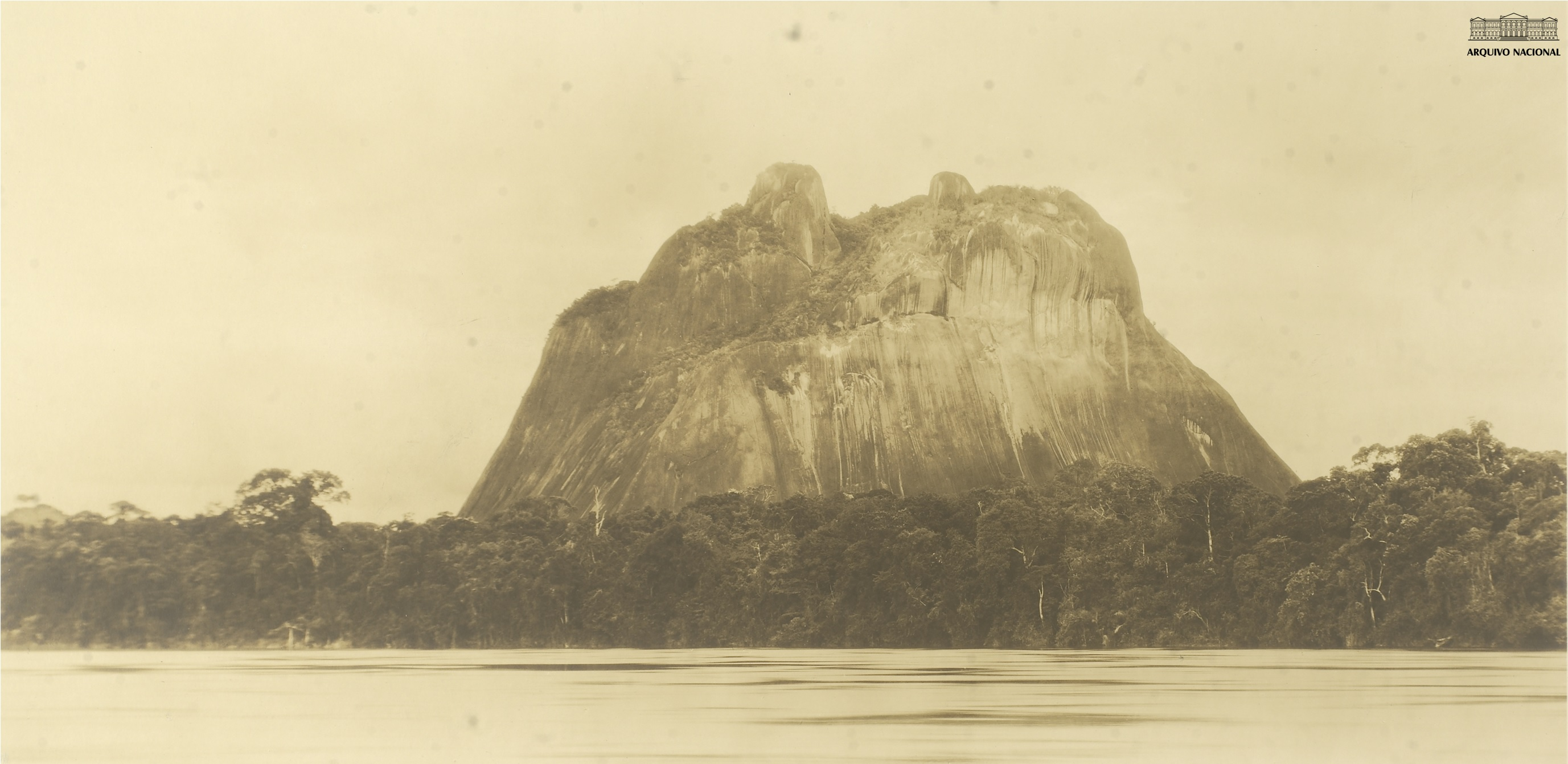 Pedra de Cucuí, Amazonas, 1929-1930